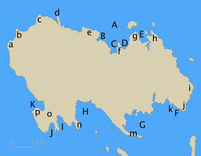 Pobřeží ostrova Vormsi (výběžky a zálivy).